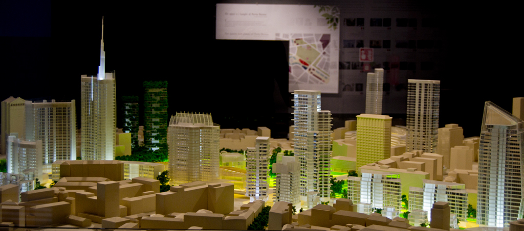 Progetto Porta Nuova, Milan, Italy June 2012 Project inside Riccardo Catella's building